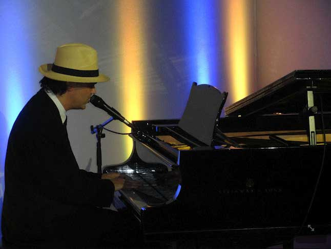 Festival de Cannes - Daniel Jobim faz show na Festa do Brasil.